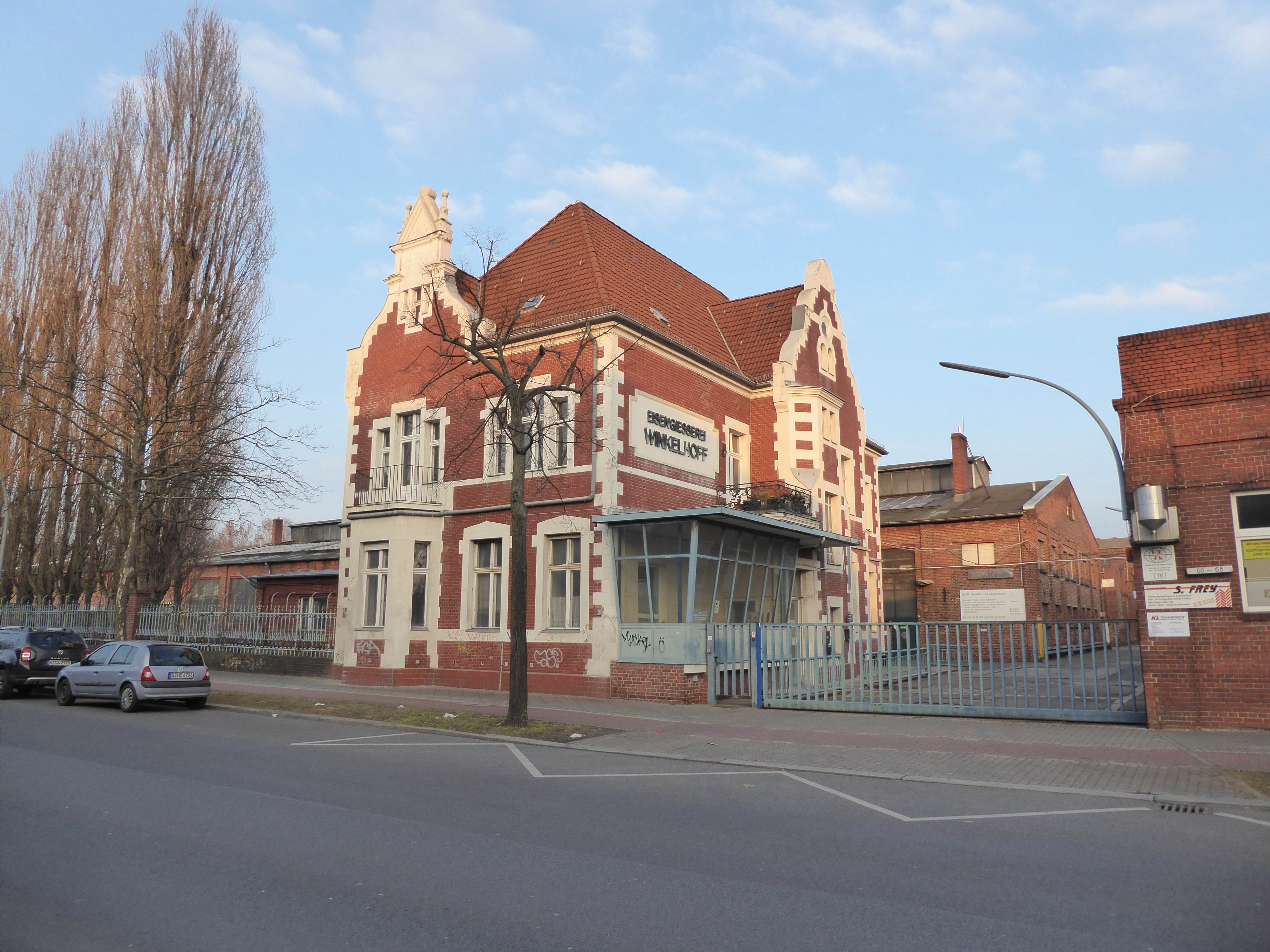 Reinickendorf Kopenhagener Straße Eisengießerei Winkelhoff